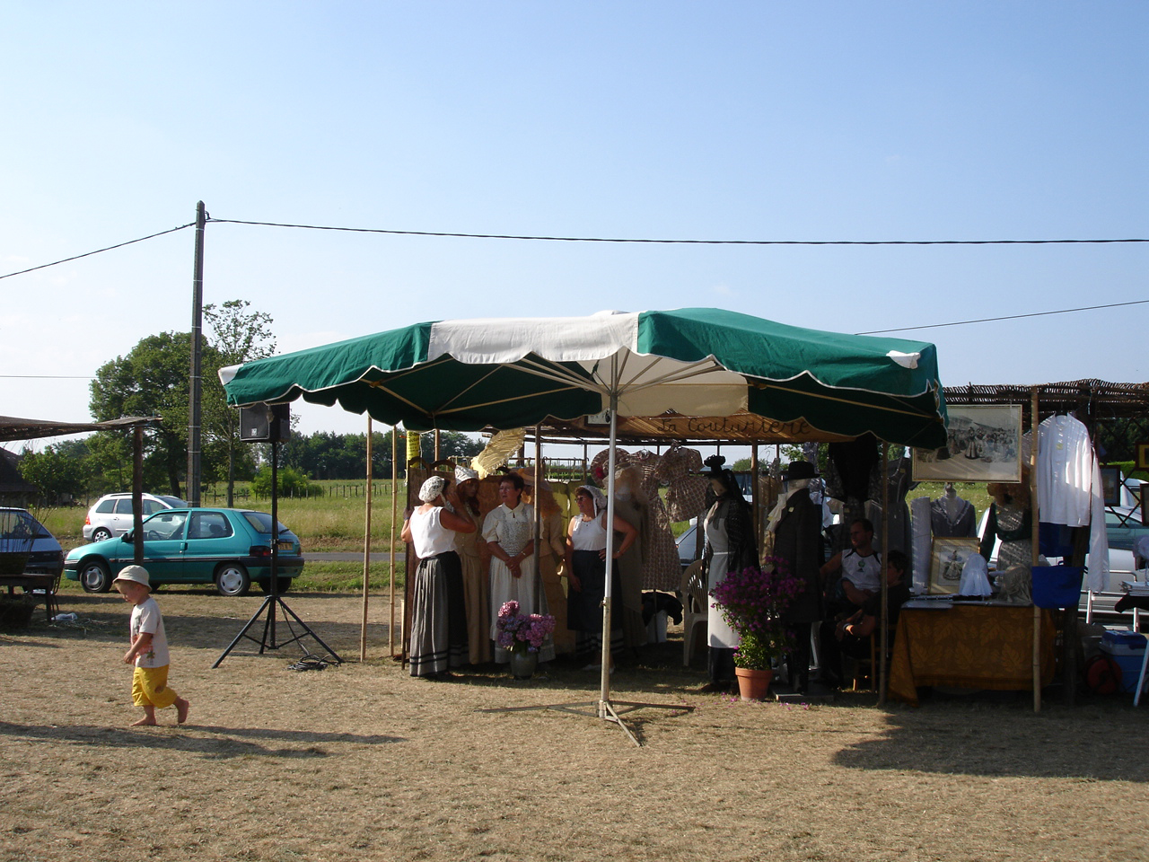 Foire à l'ancienne à Brienne (71)